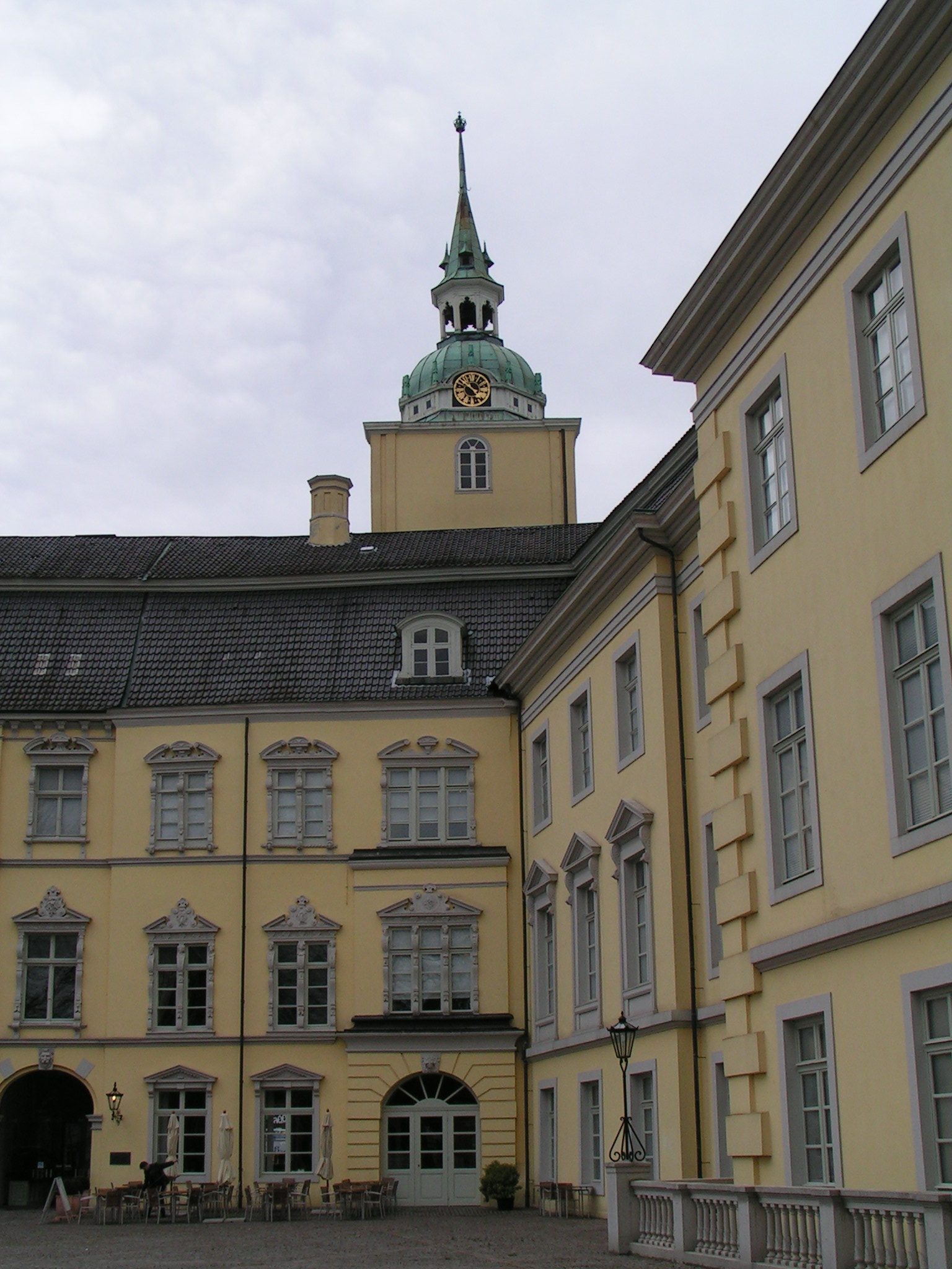 Innenhof des Schlosses Oldenburg (Oldenburg)